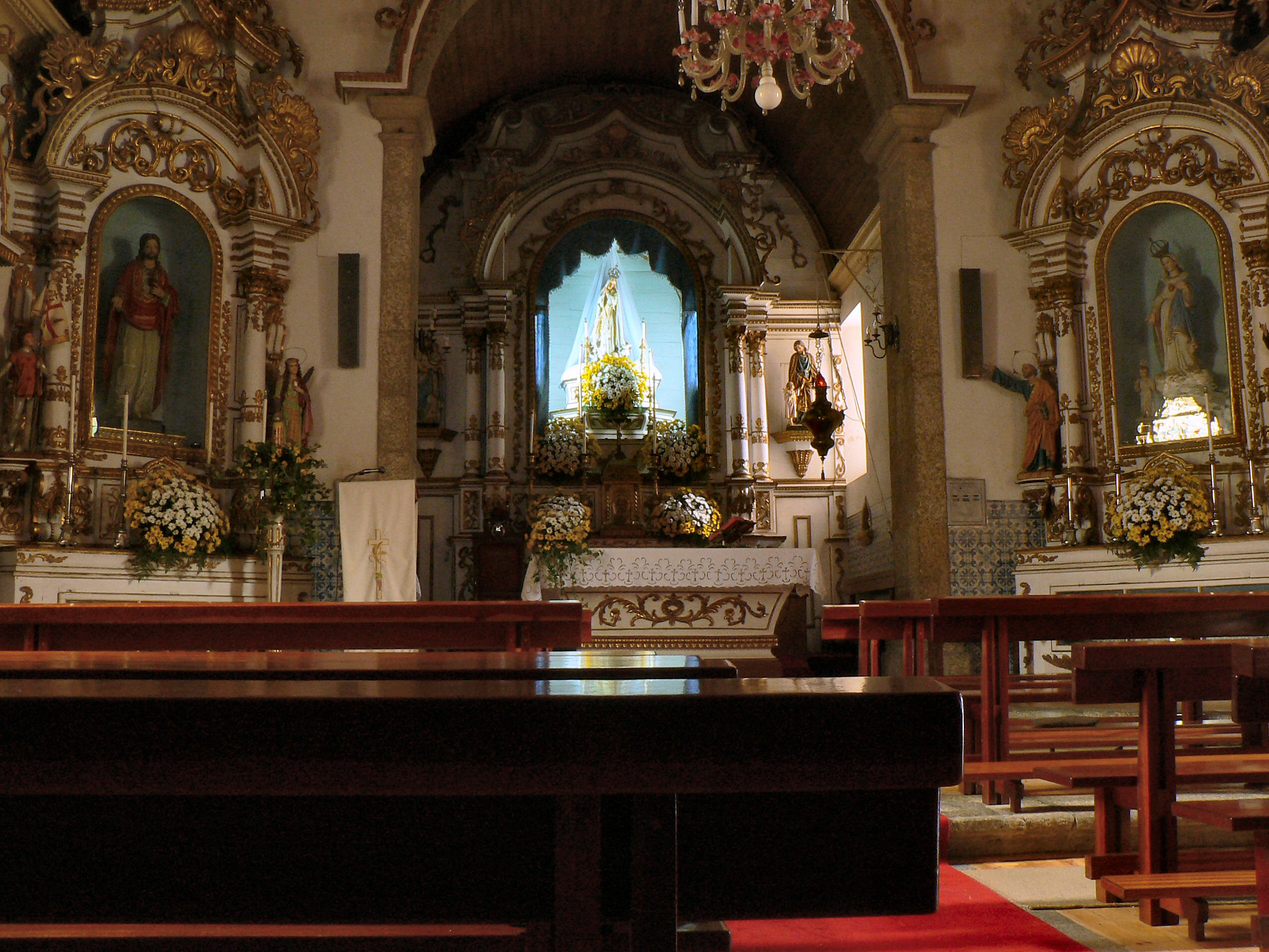 Igreja Matriz de Loriga - Altar